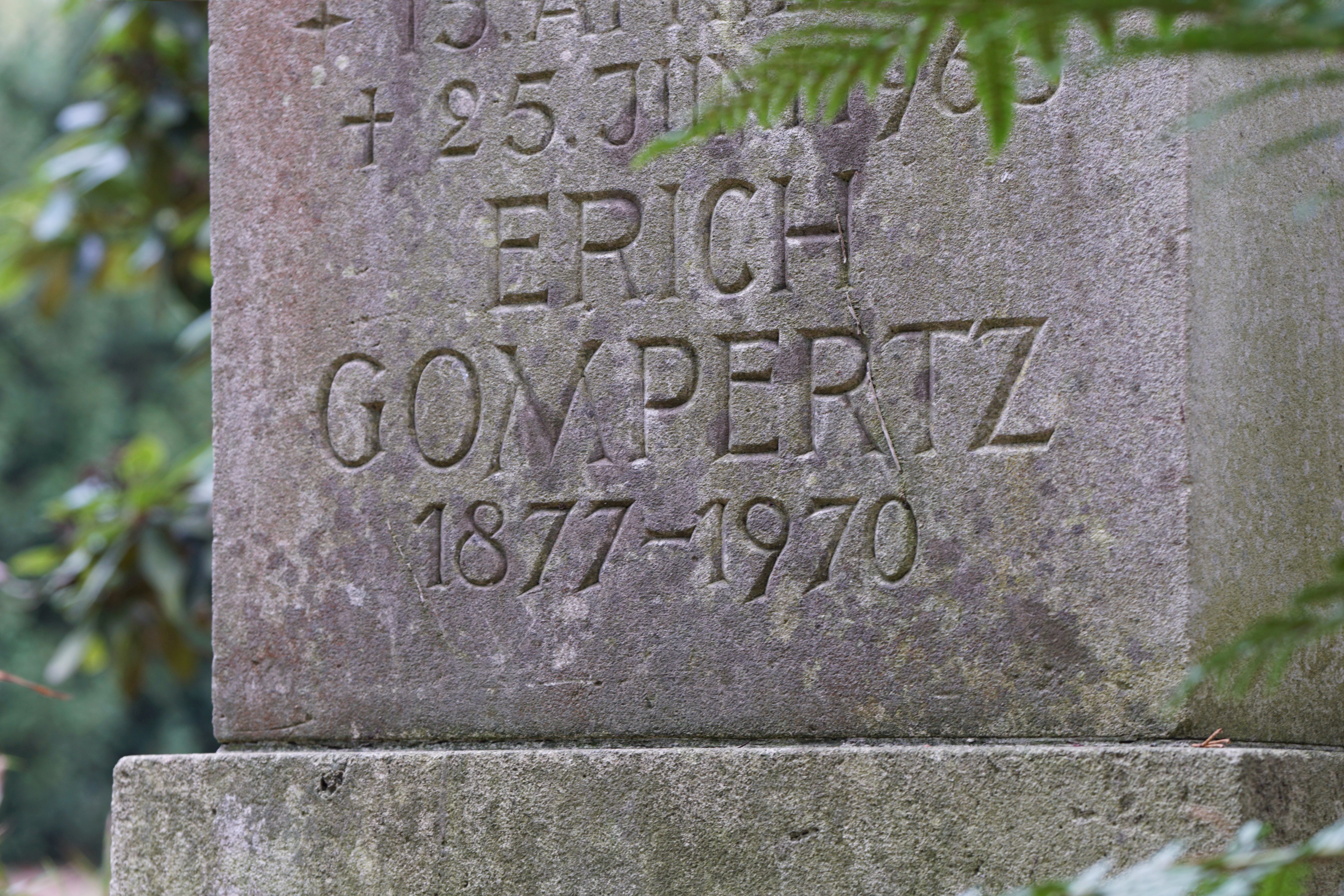 Grabstätte der Familie Gompertz auf dem Stadtfriedhof Stöcken (Abteilung A33 Nummer 165) Inschrift auf der Vorderseite: FAMILIE GOMPERTZ HIER RUHT MEINE INNIGSTGELIEBTE FRAU UND GUTE MUTTER ELSE GOMPERTZ GEB. GOMPERTZ 15. APRIL 1884 25. JUNI 1965 ERICH GOMPERTZ 1877-1970